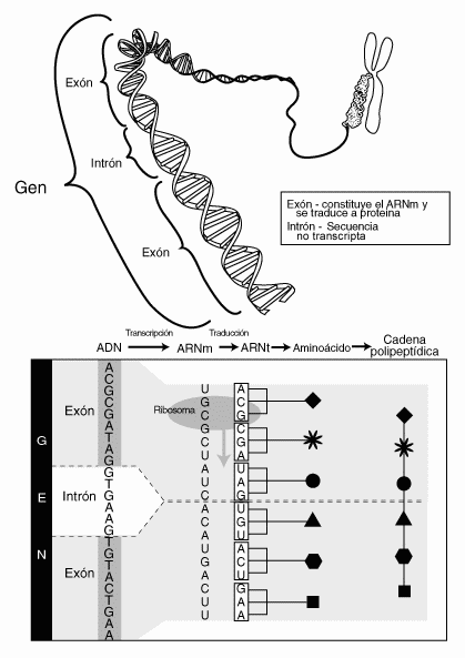 Intron